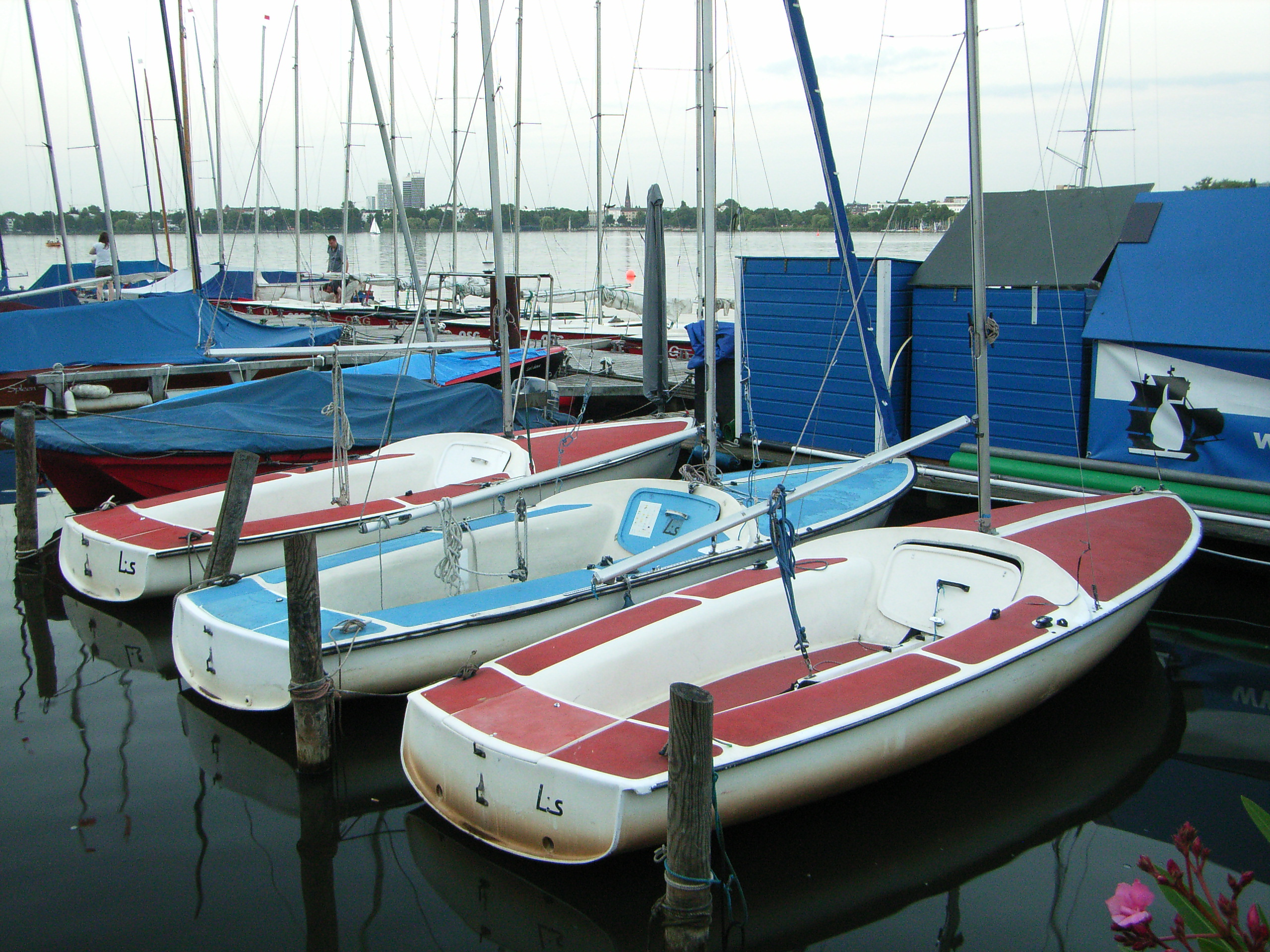 Lis-Jollen am Steg (Hamburg, Alster)